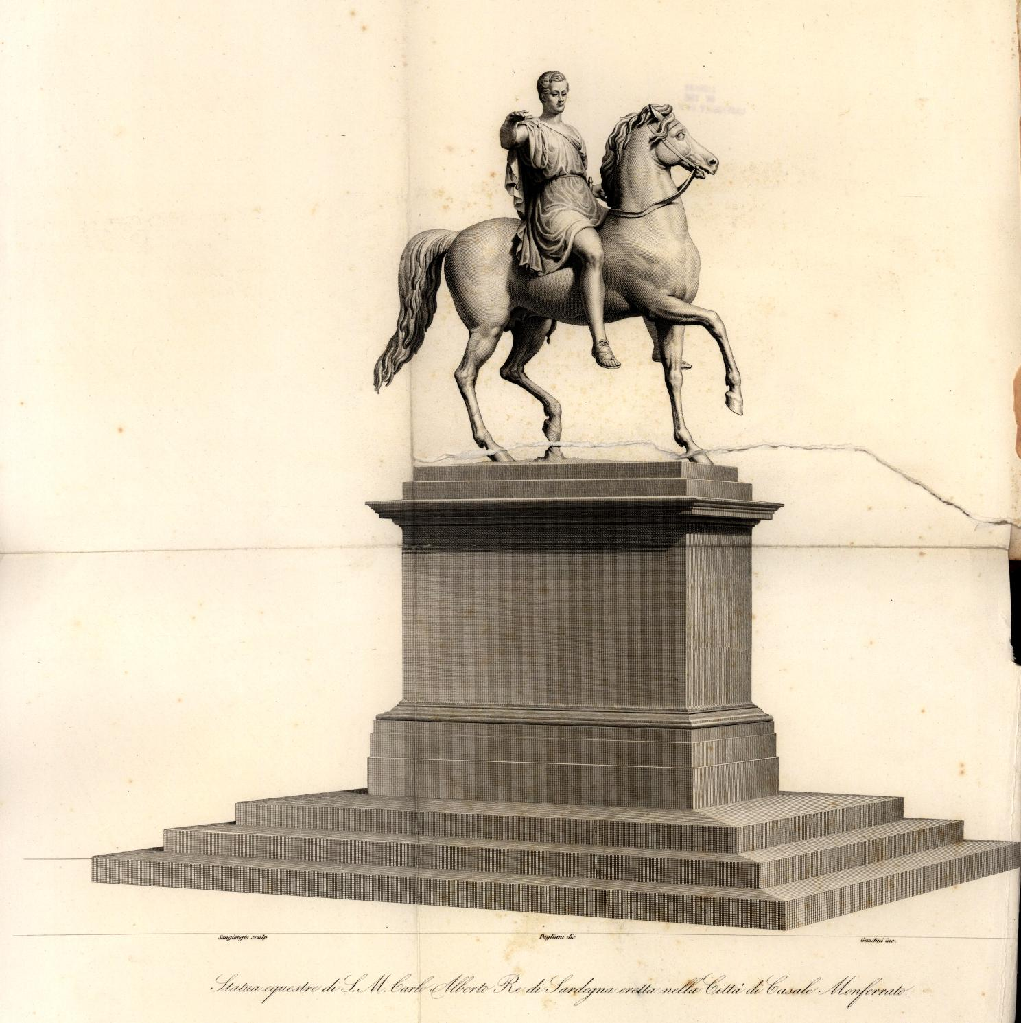 Statua equestre si S,M. Carlo Alberto Re di Sardegna eretta nella Città di Casale Monferrato (Eleuterio Pagliano, 1843)